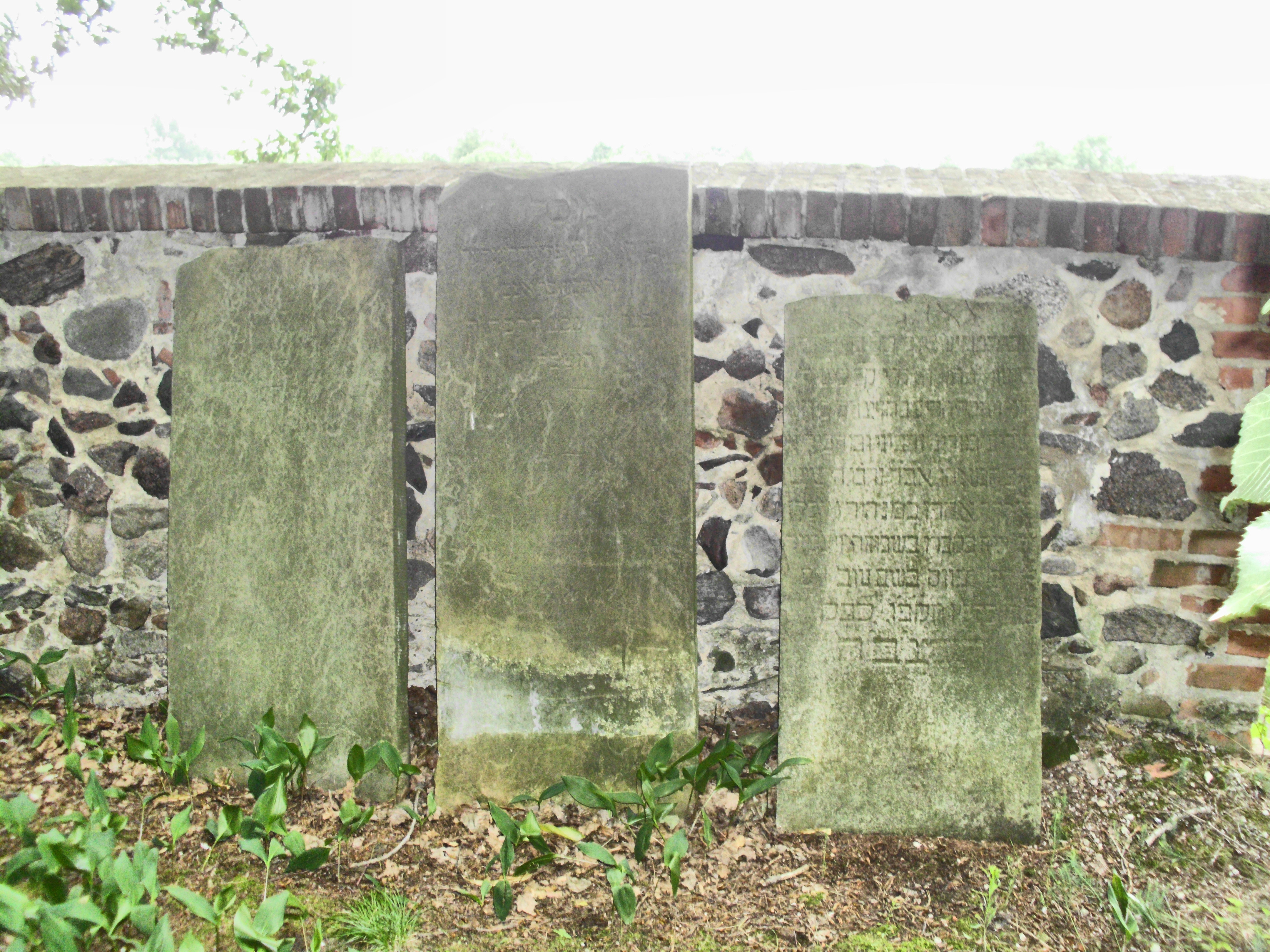 Grabtafeln auf dem Jüdischen Friedhof in Friedland bei Beeskow, Brandenburg, Deutschland